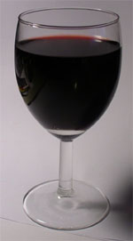 Gilde glass (Royal Leerdam).